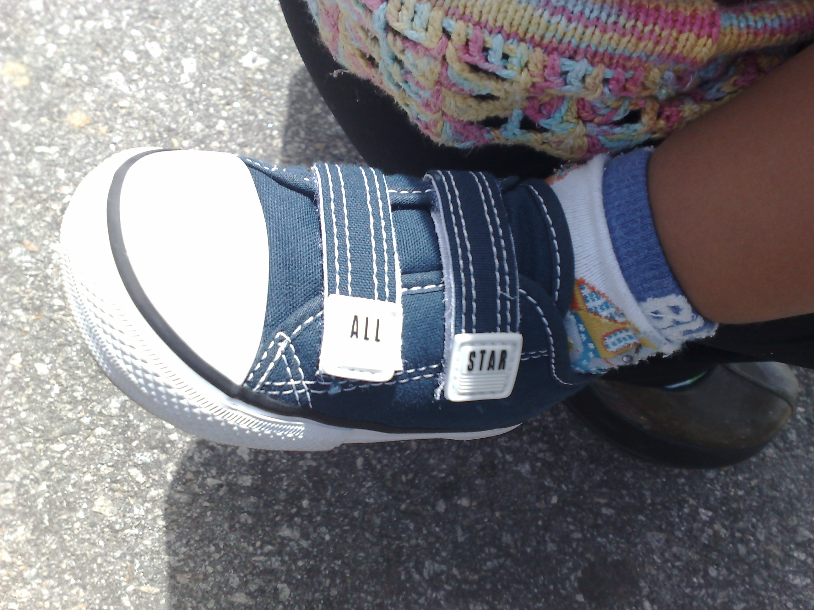 Modelo infantil All Star